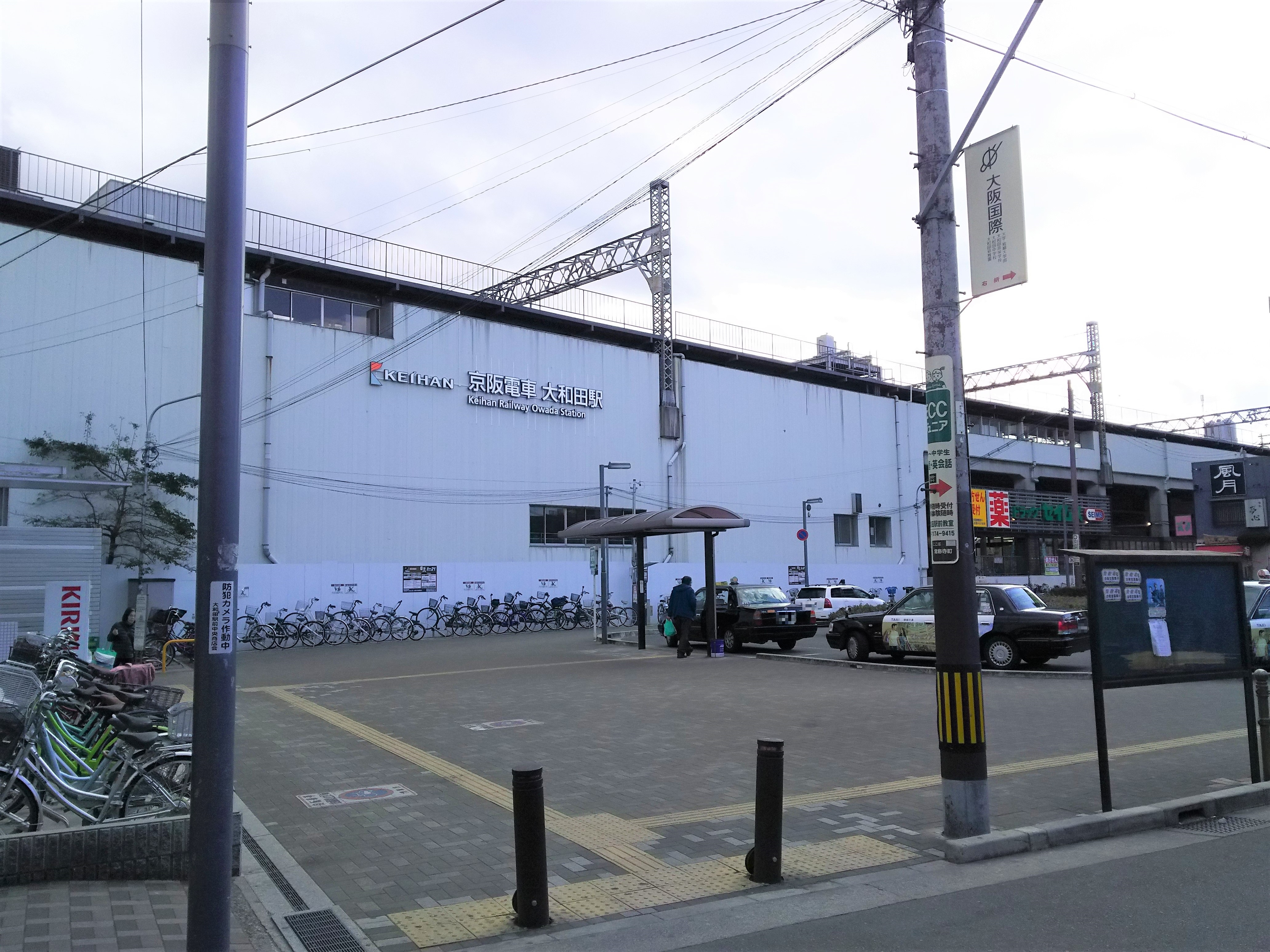 京阪本線大和田駅（大阪府門真市）